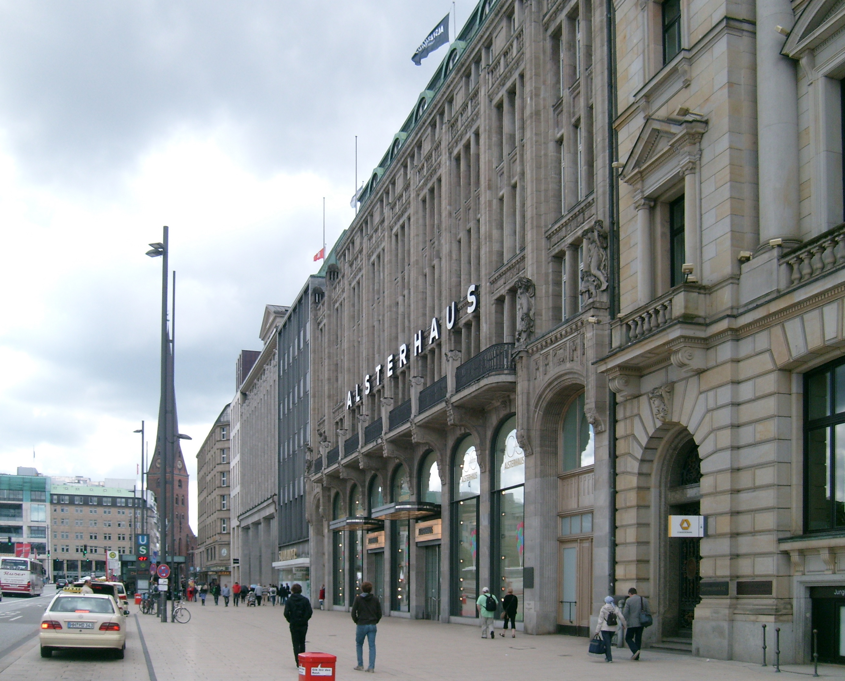 Alsterhaus